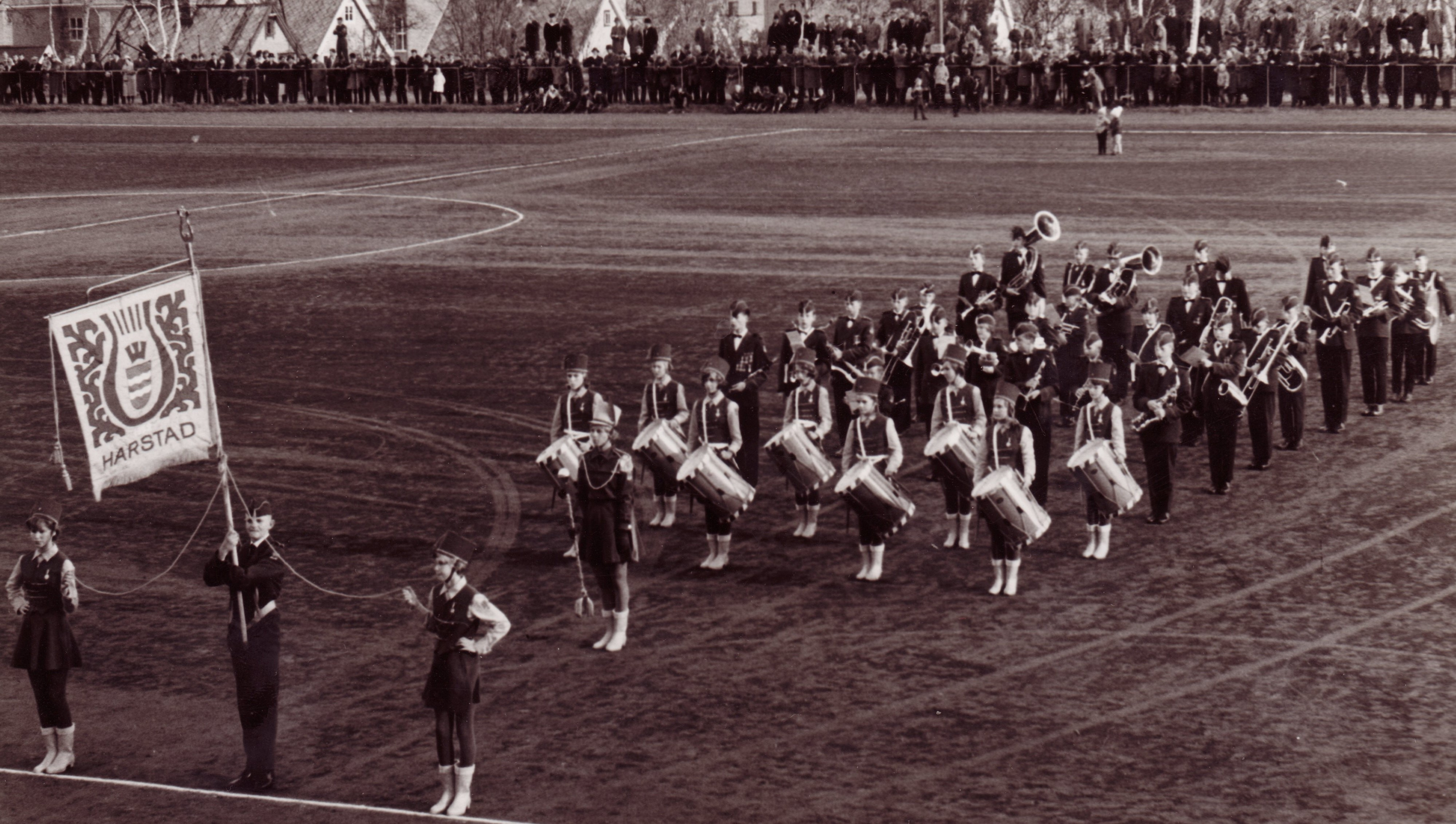 Harstad Folkeskoles Musikkorps opptrer i pausen i en fotballkamp mellom Harstad Idrettslag og Bodø/Glimt.